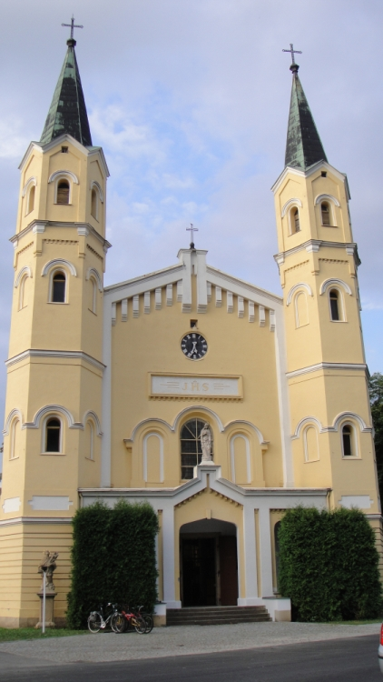 Kostel Povýšení Svatého kříže u Kunínského zámku